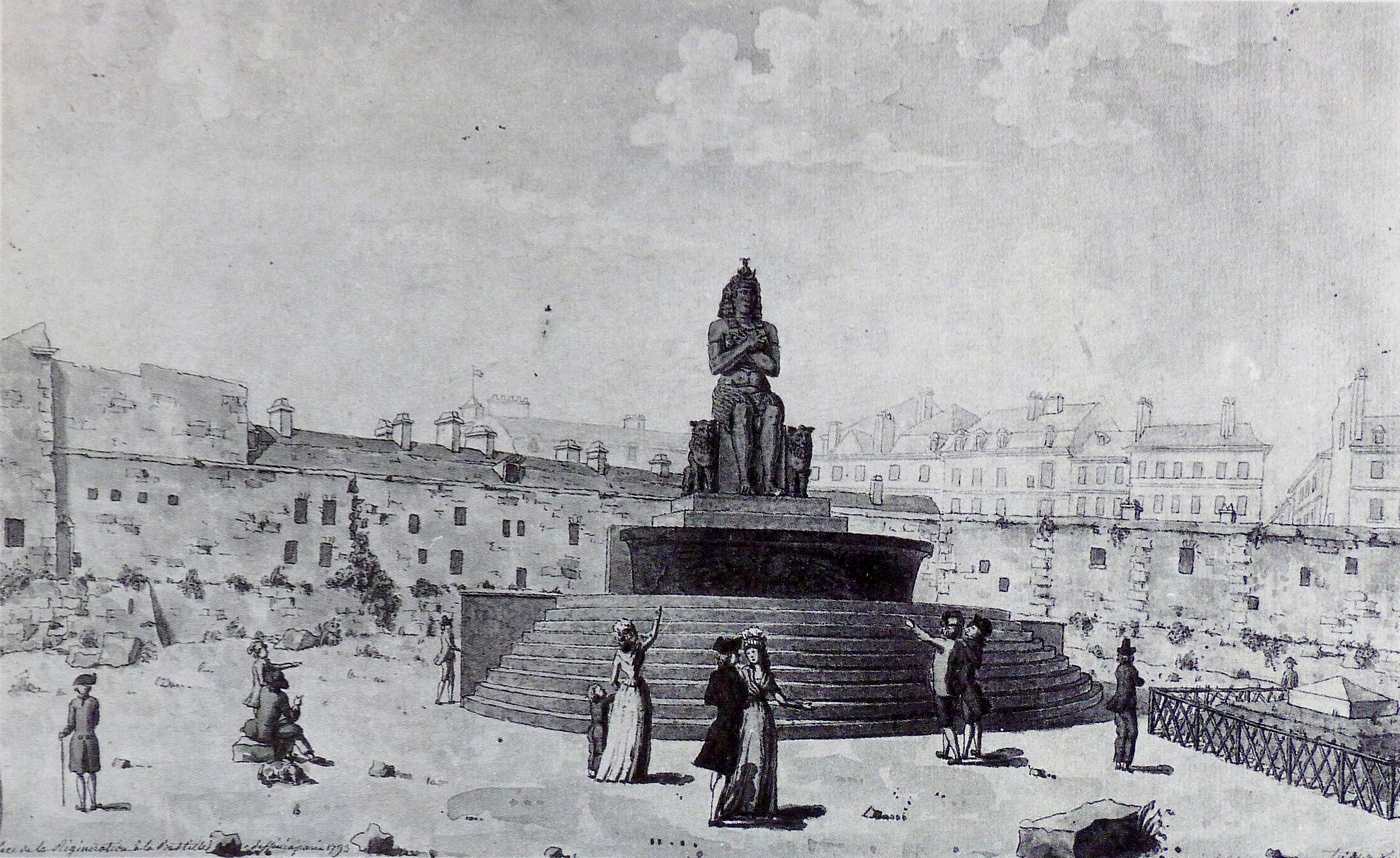 Fontaine de la Régénération nationale, ou fontaine d'Isis (1793), place de la Bastille, Paris - Dessin aquarellé de Joseph Tassy, musée Carnavalet, Paris. Publication en noir et blanc dans "Aux armes et aux Arts", Adam Biro, 1988.